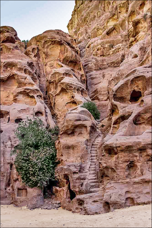 Pétra. La montagne creusée par les eaux au fil des siècles.